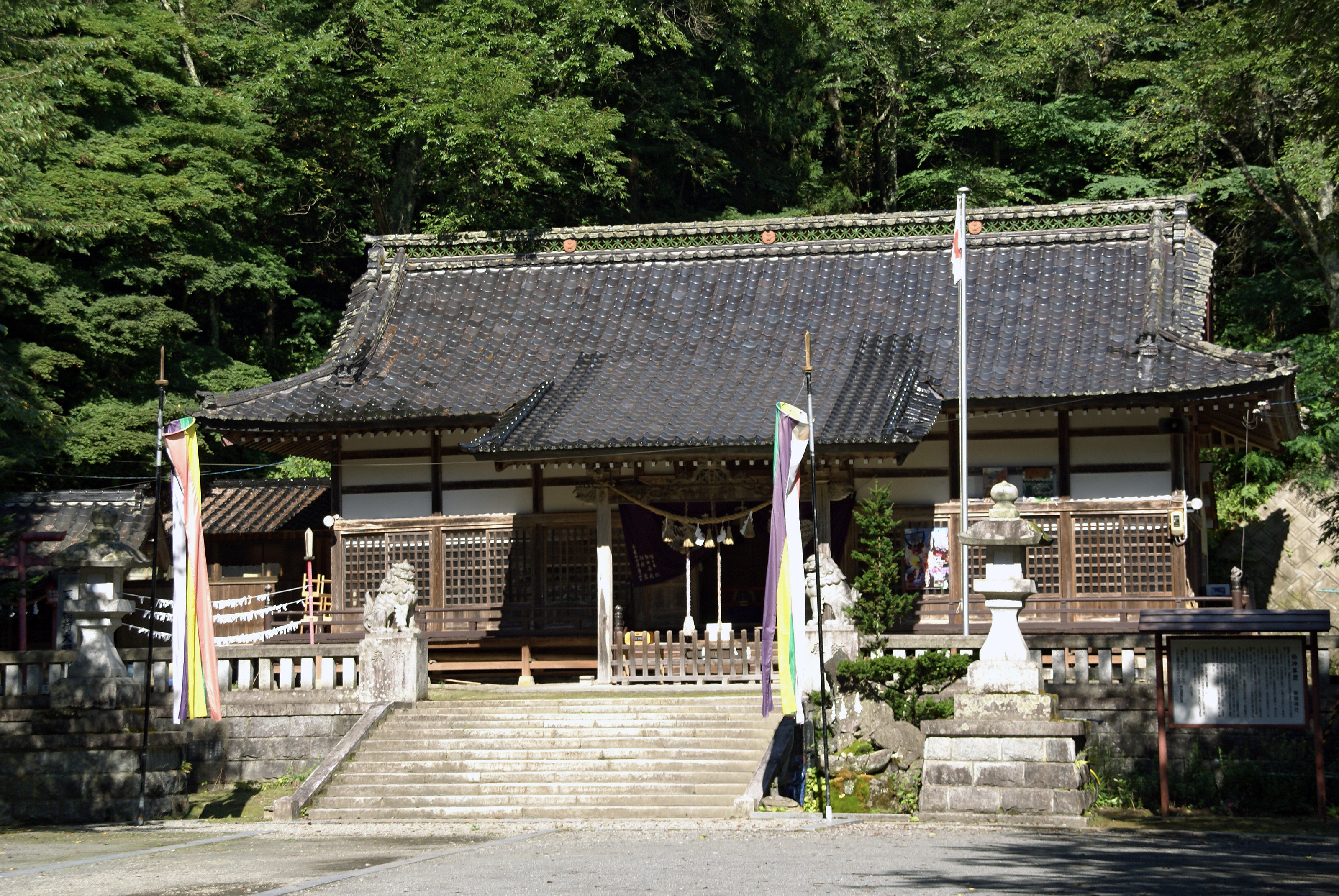 Nanbu-jinja in Tono, Iwate prefecture, Japan